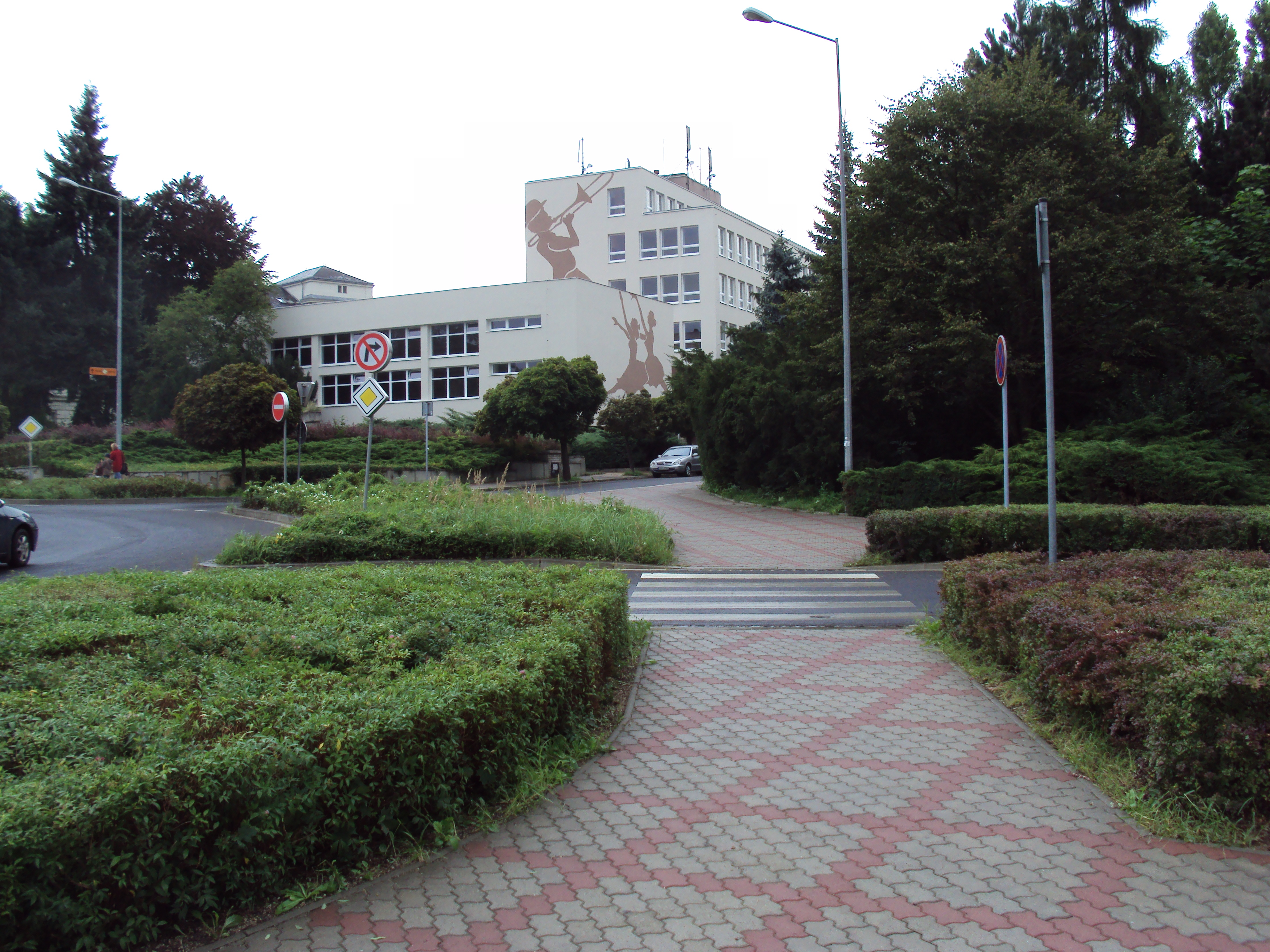 Základní umělecká škola, Arbesova 2077, Česká Lípa, po opravě omítky